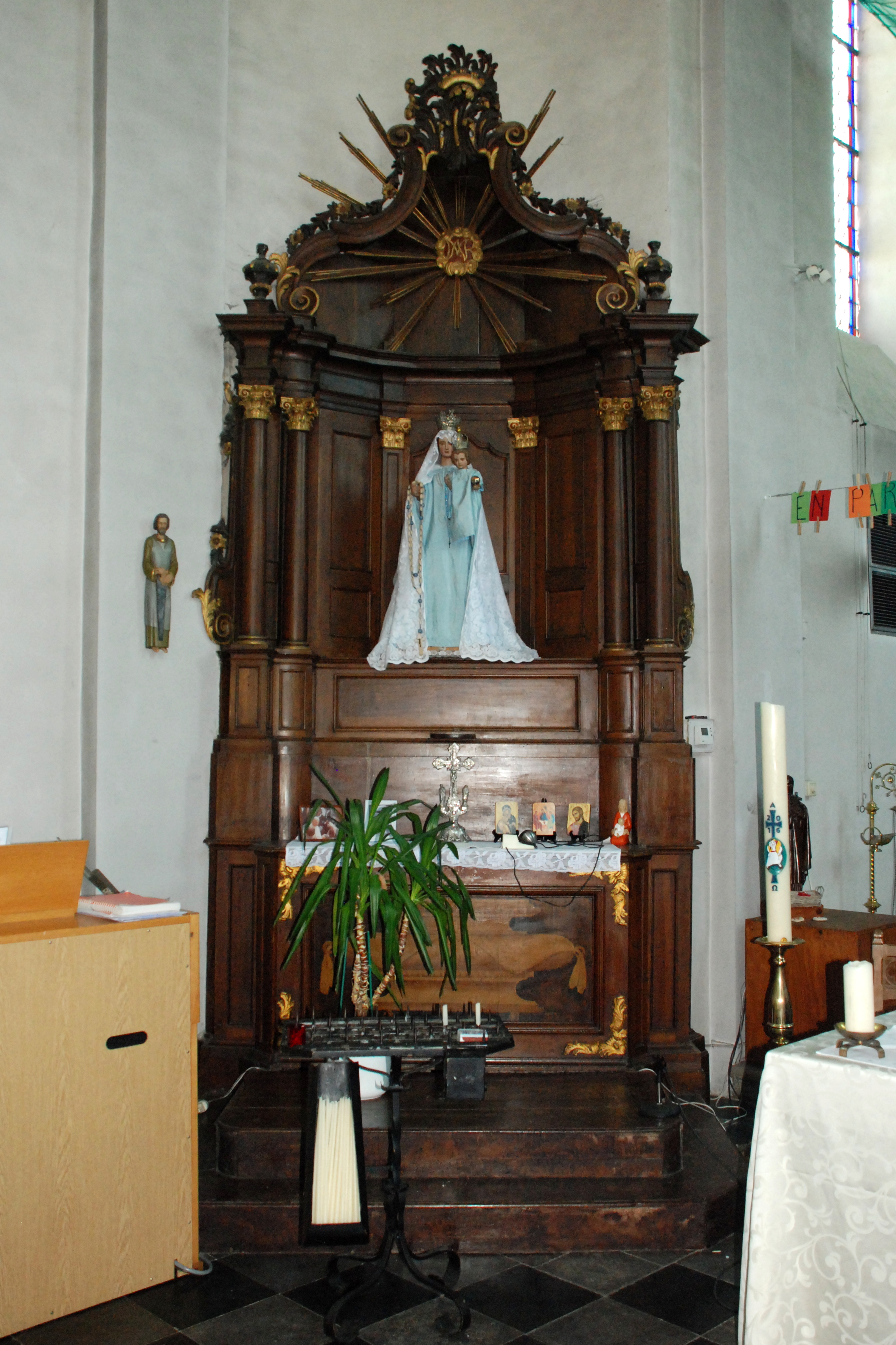 Belgique - Brabant wallon - Jodoigne - Saint-Remy-Geest - Église Saint-Remy